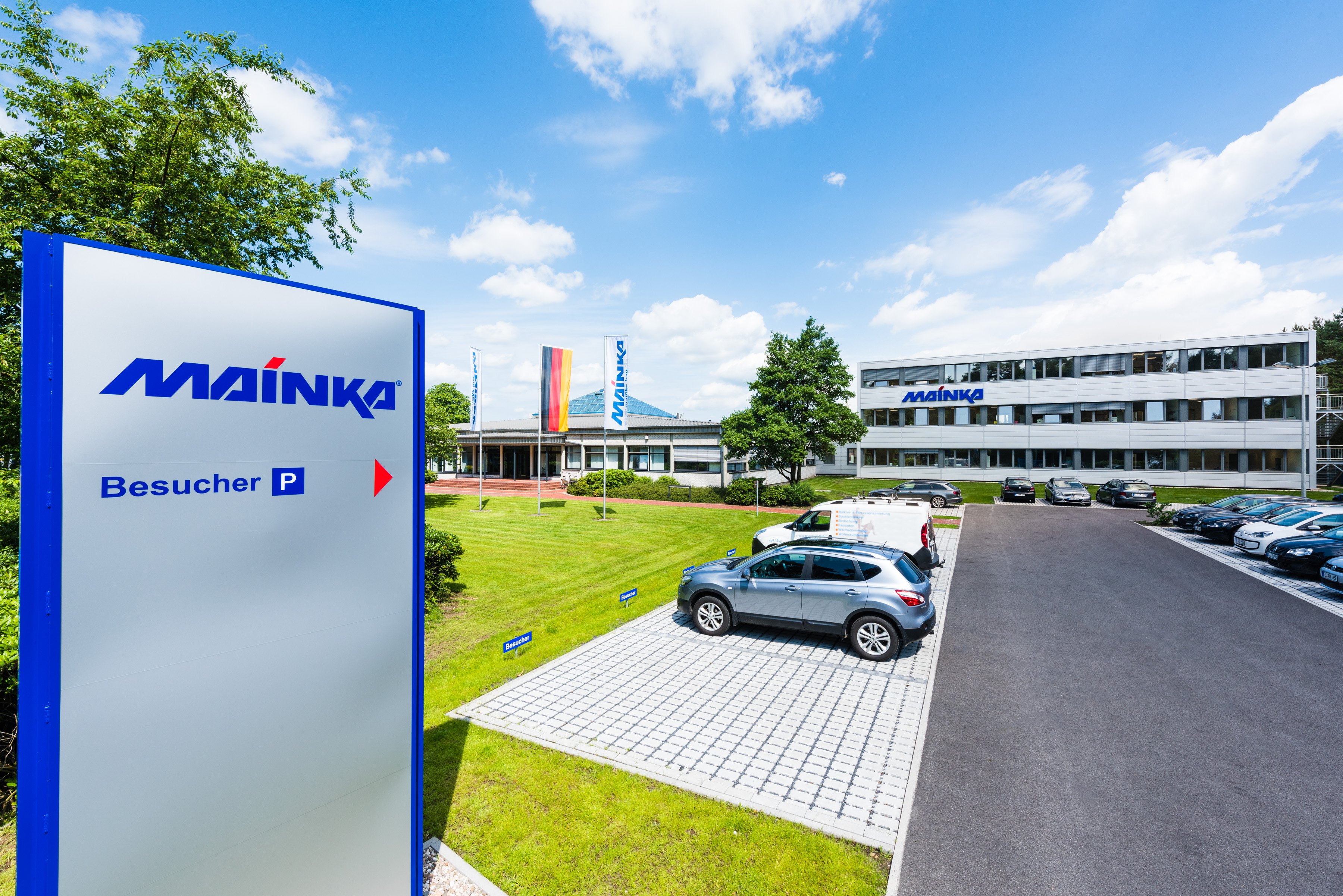 Zentrale der Mainka Bau GmbH & Co. KG (Aufnahme von 2016)